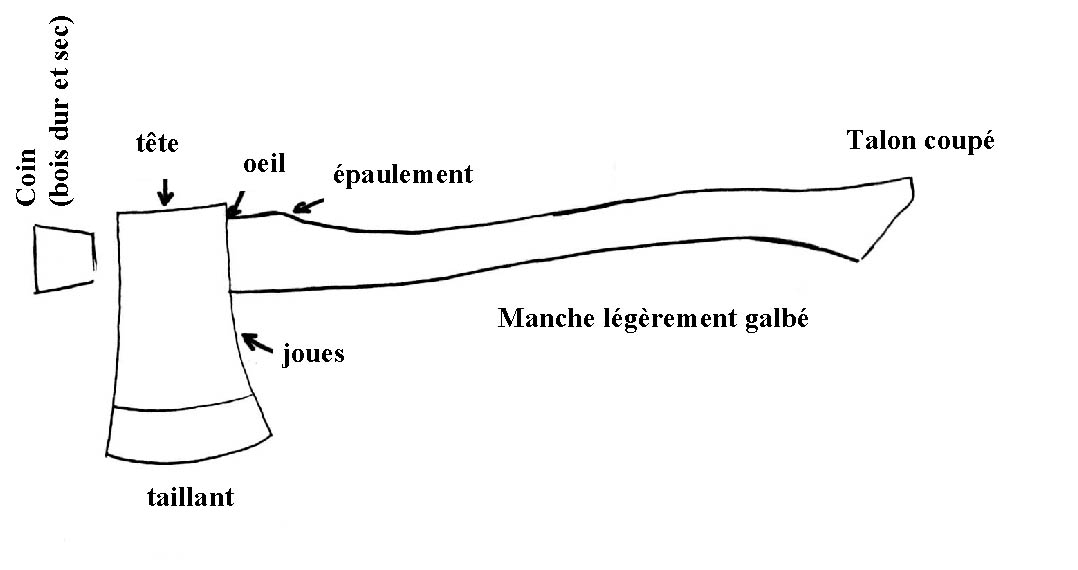 hachette (outil) Auteur : Taveneaux 8 février 2006 à 11:40 (CET)